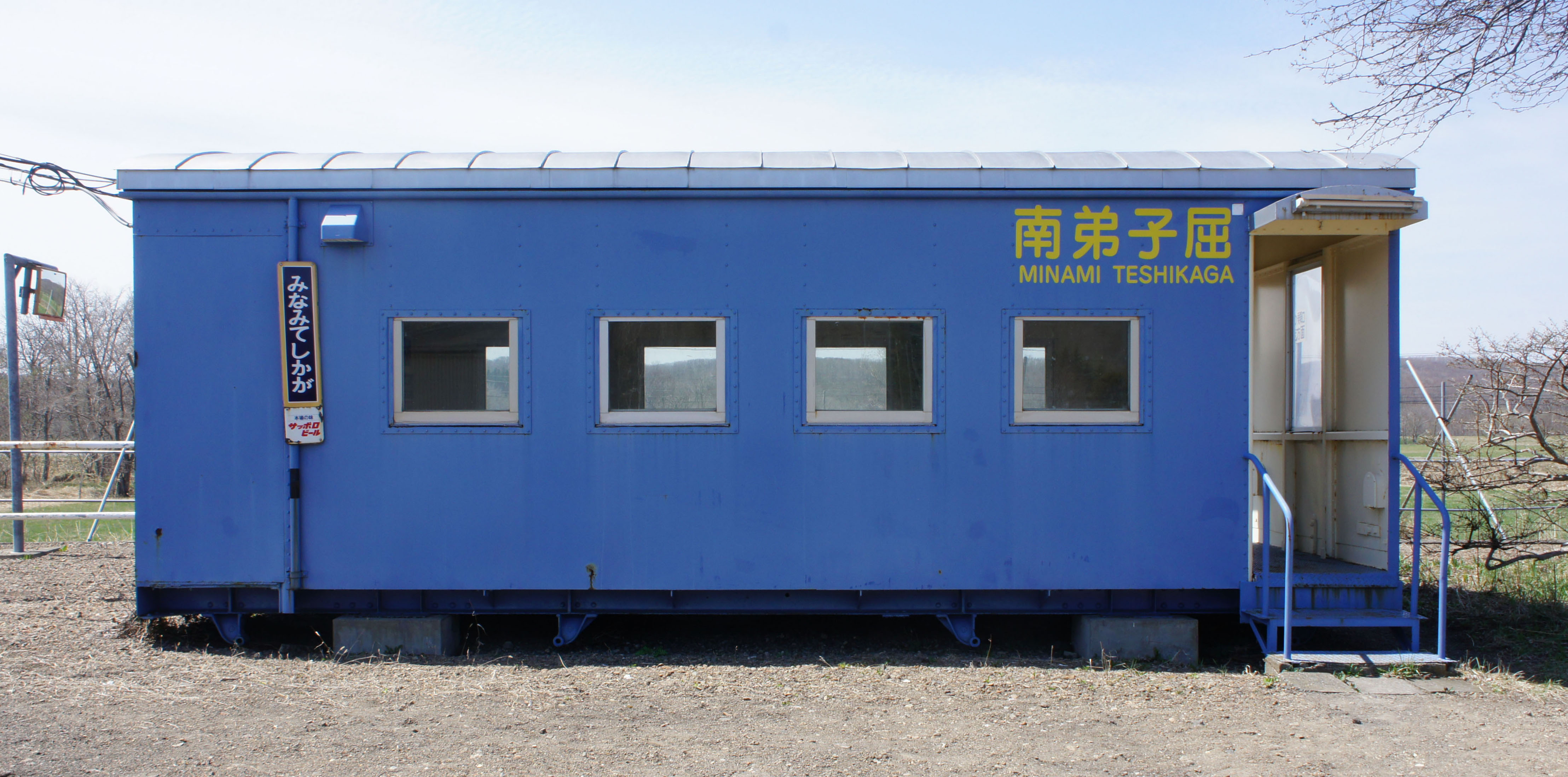 JR釧網本線・南弟子屈駅の駅舎 Sony NEX-3